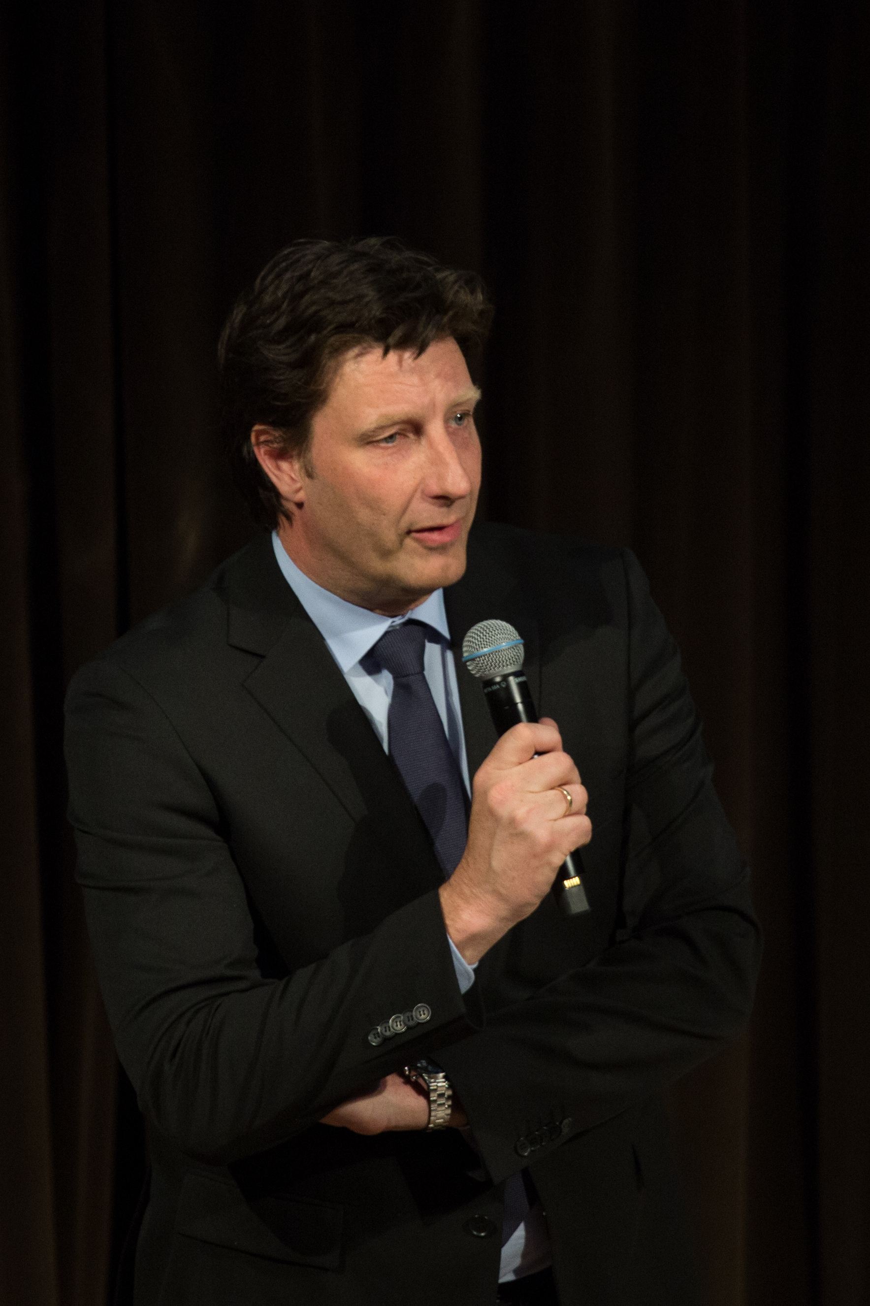 Jan Müller